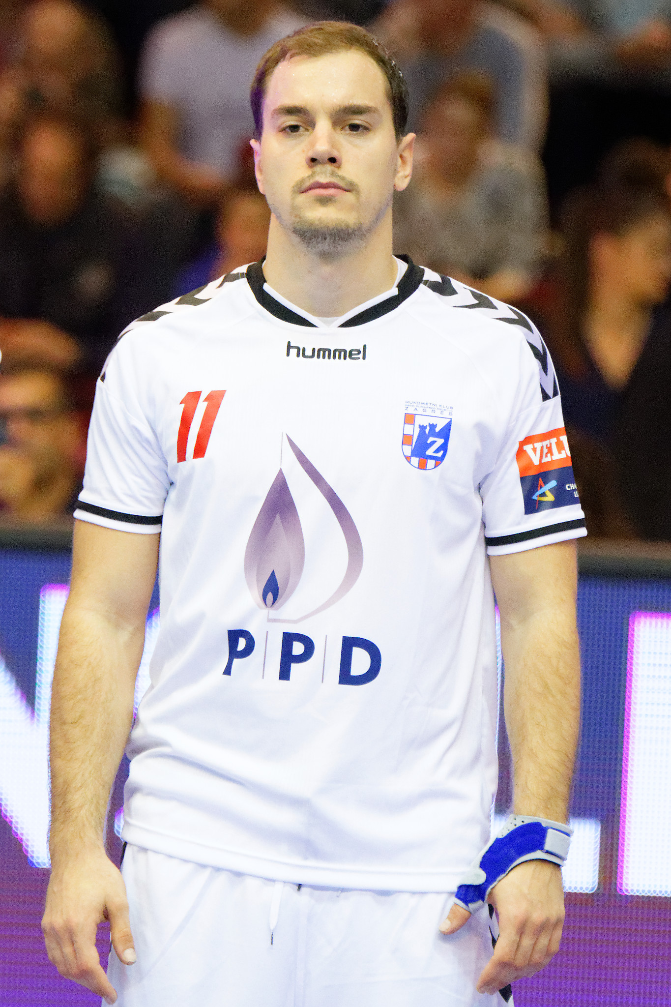 Rencontre de phase de groupe de la ligue des champions 2015-16 entre le PSG et le RK Zagreb. A la Halle Carpentier (Paris), le 11 ocotbre 2015.